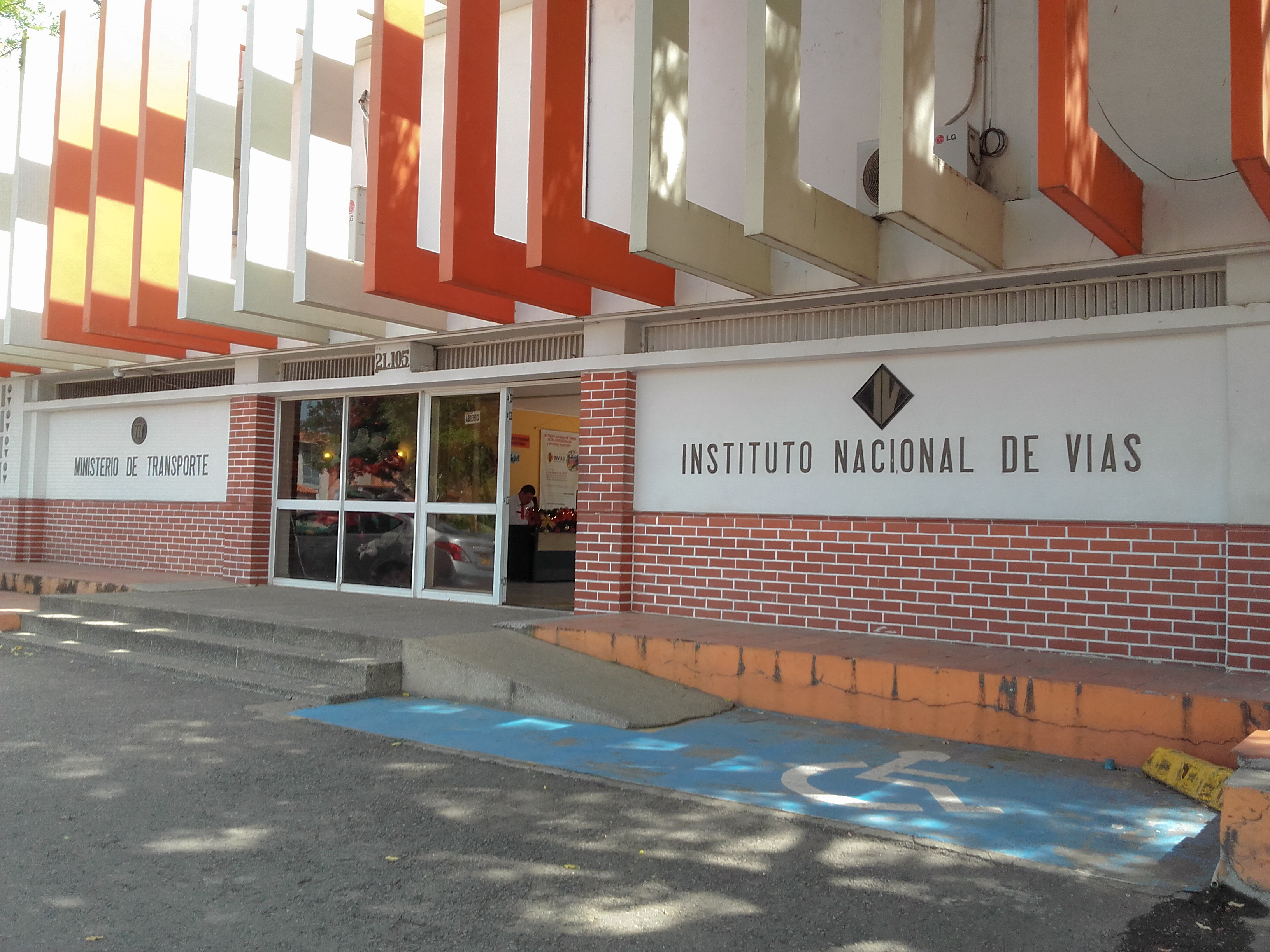 dndnnfnfnfnf